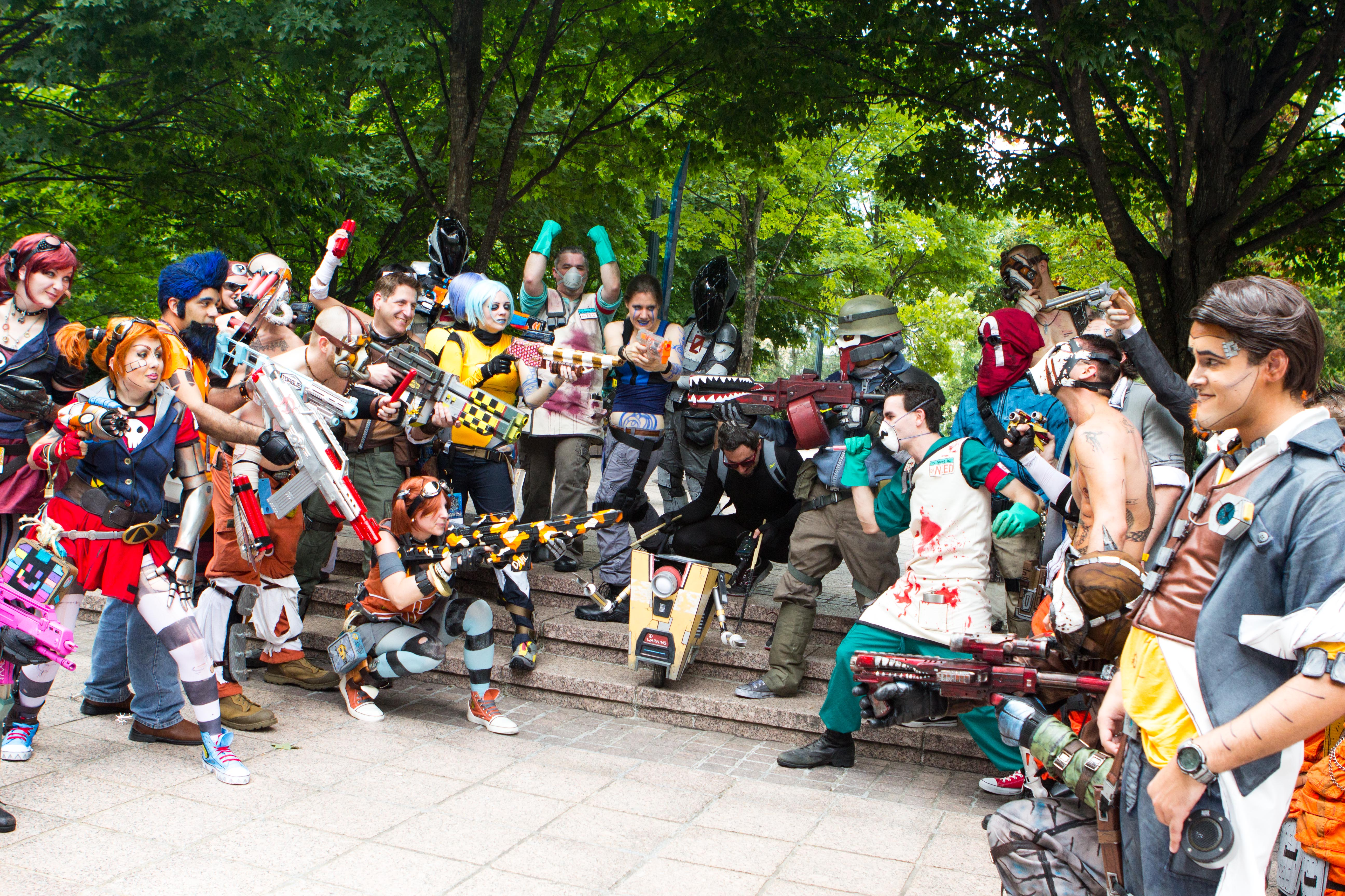 Cosplay at Dragon*Con 2013.